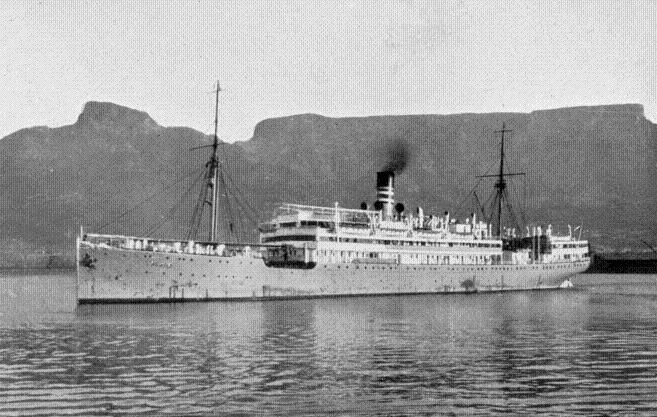 Der Reichspostdampfer KIGOMA der DOAL